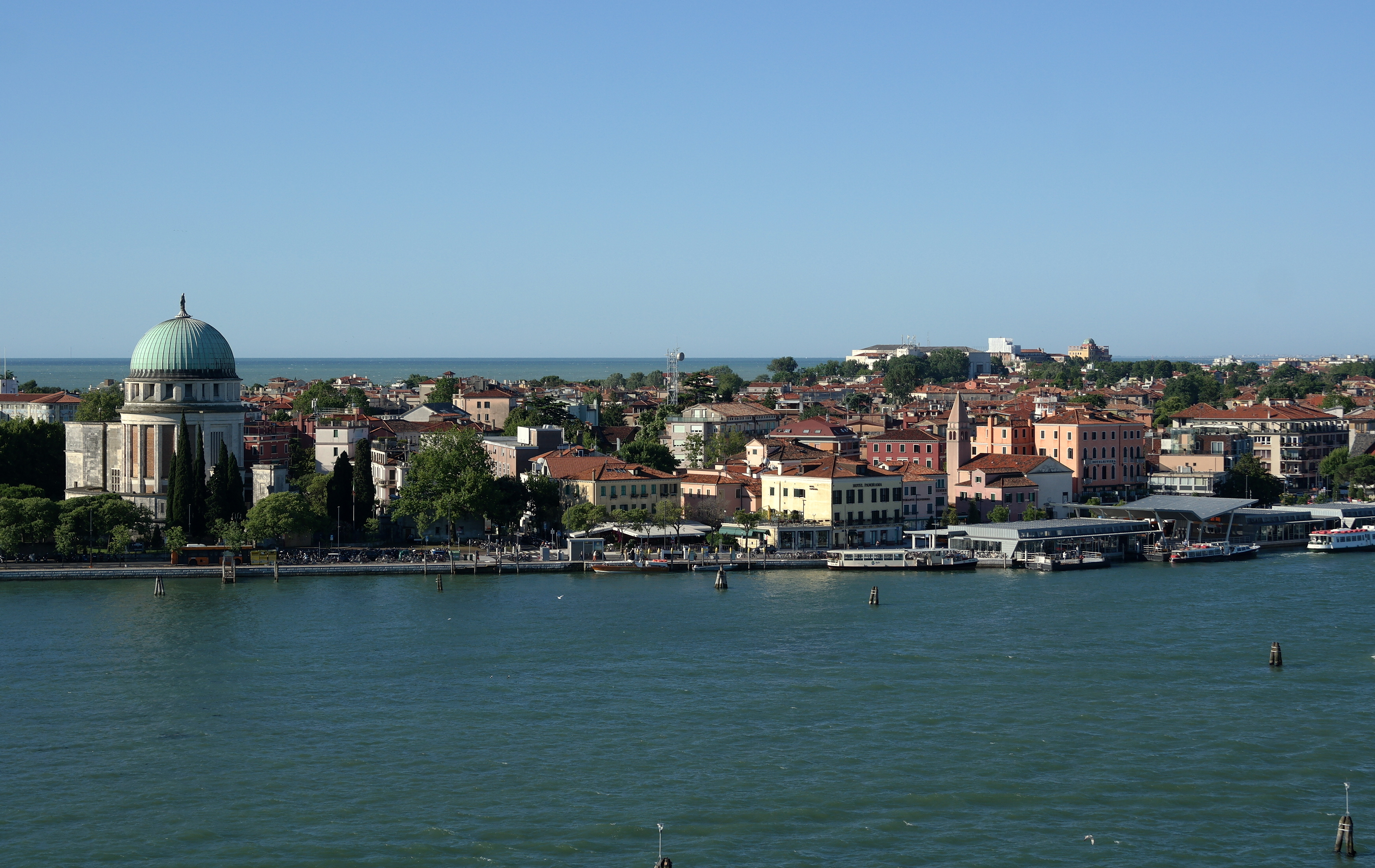 veduta del Lido di Venezia